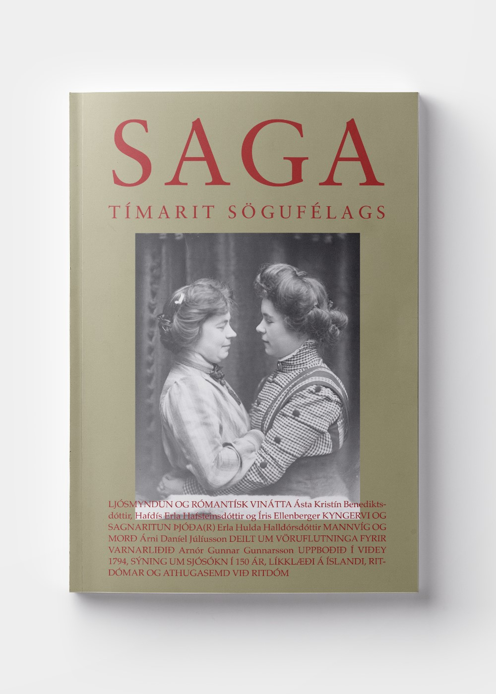 Saga 2019-1